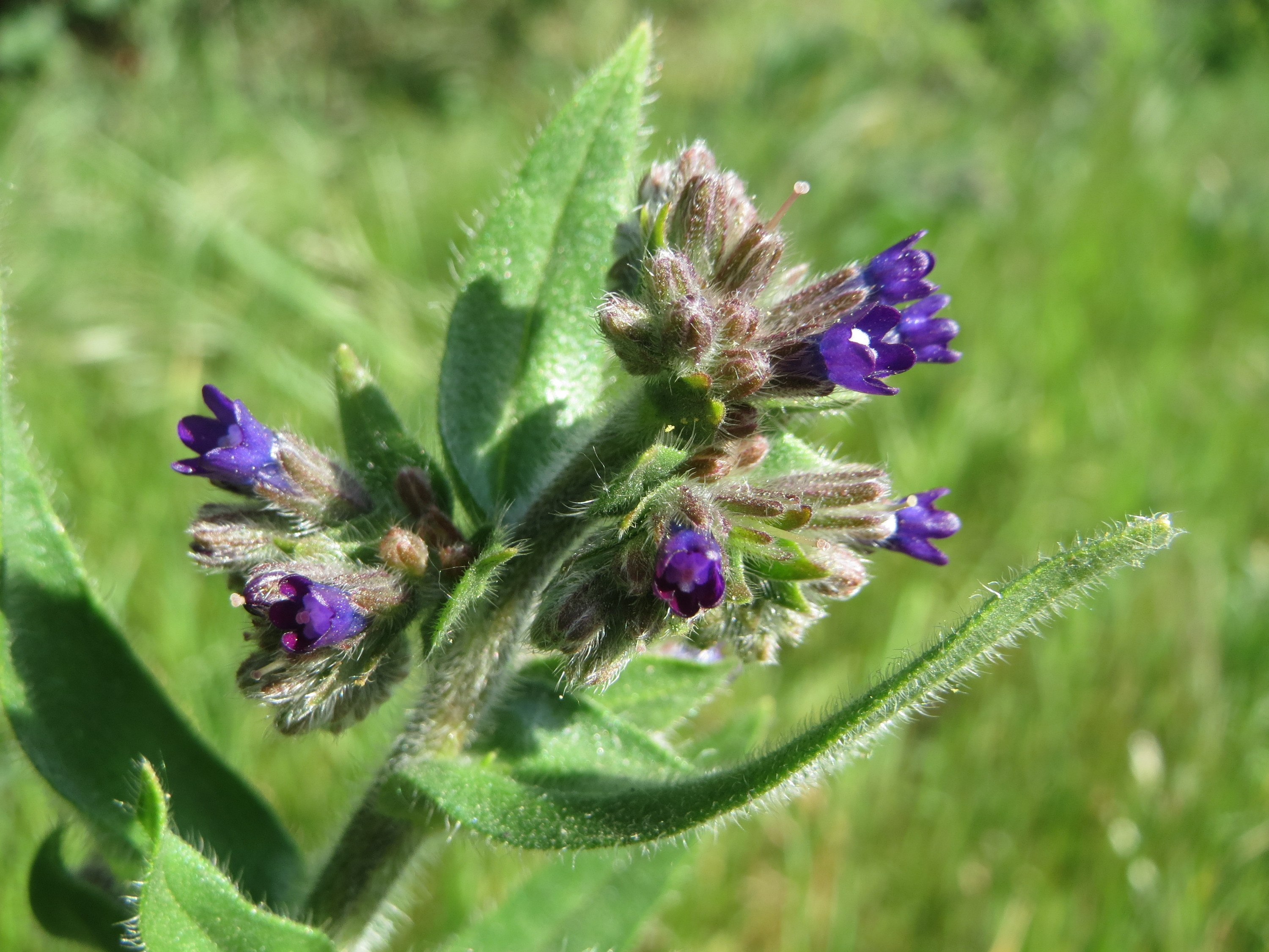 Gemeine Ochsenzunge (Anchusa officinalis) am Stadtrand von Hockenheim